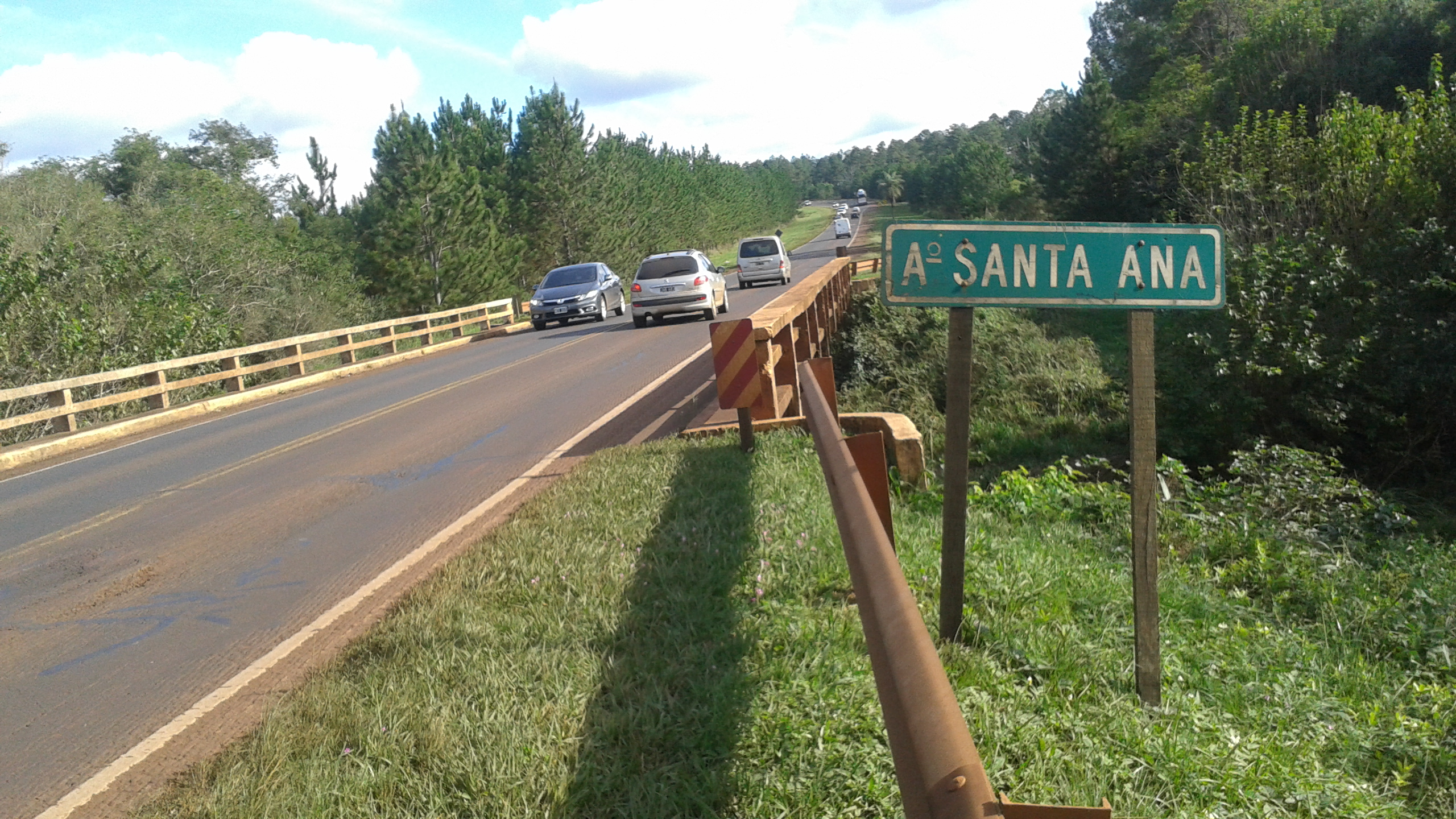 Cartel Arroyo Santa Ana (Santa Ana, Provincia de Misiones, Argentina).